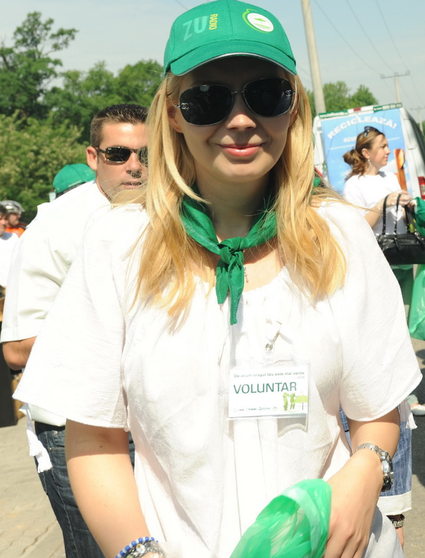 Daciana Sârbu